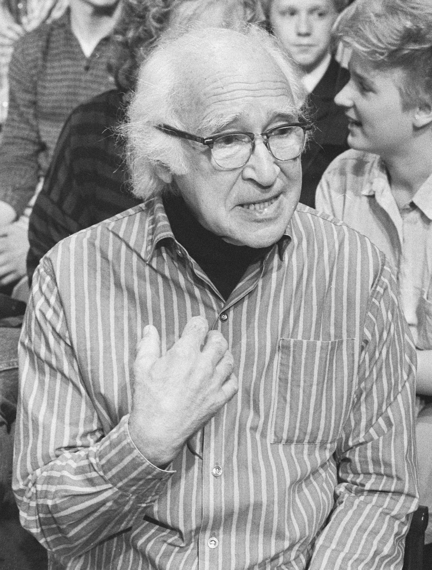 Kinderen praten met Nobelprijswinnaars in Amsterdam; George Wald